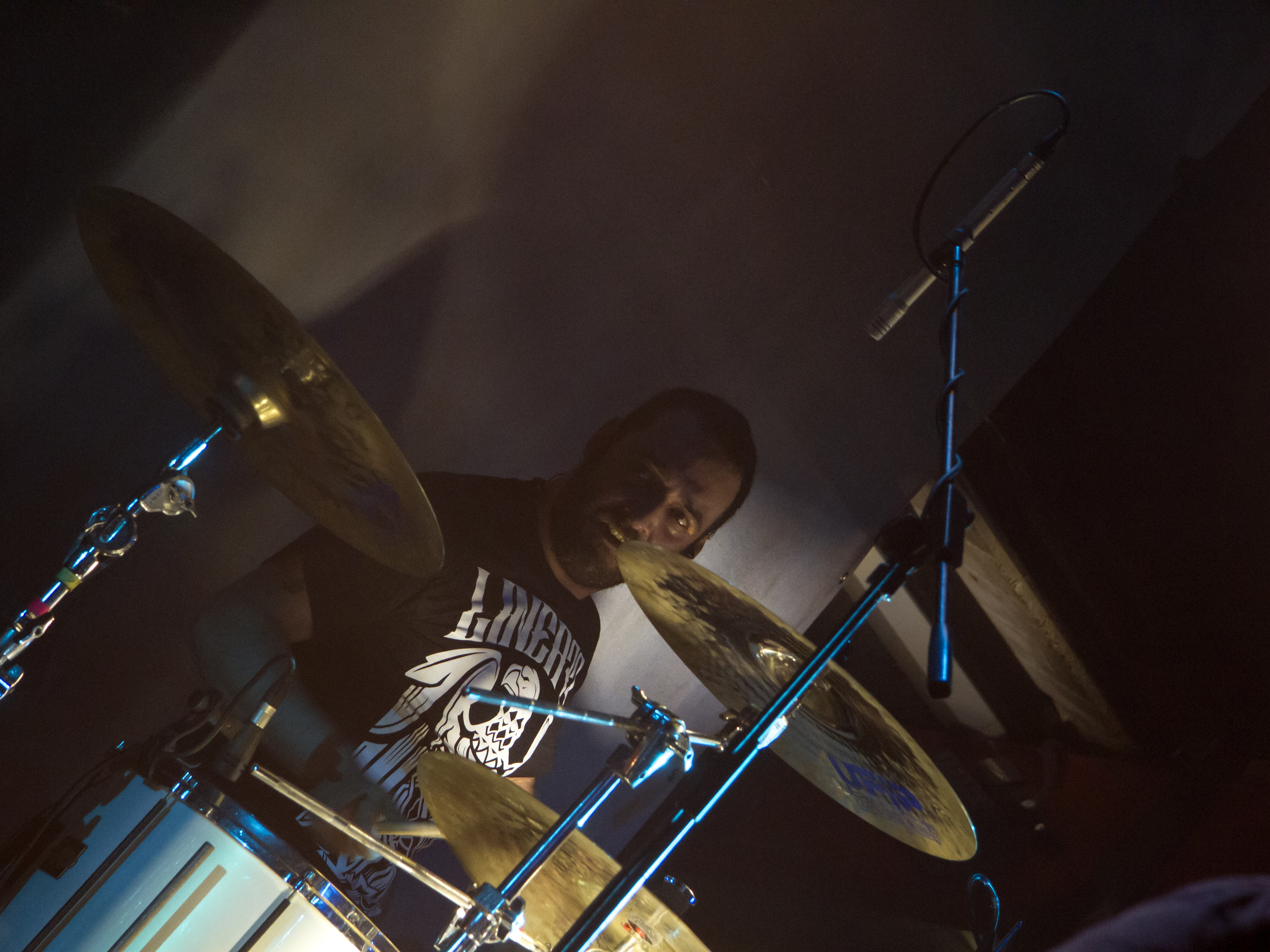 Tozzo (Firenze, Auditorium Flog)